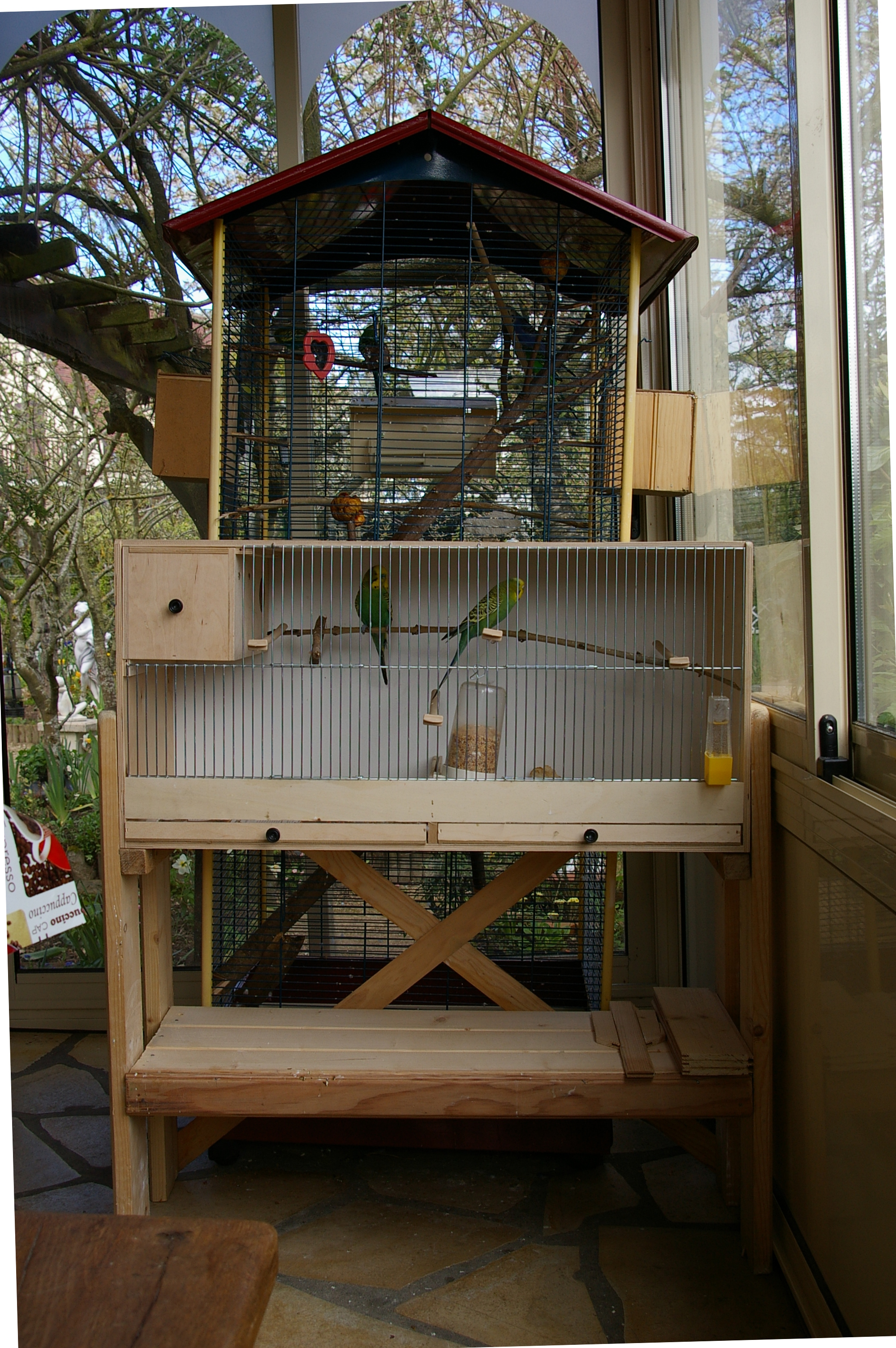 élevage de perruches ondulées chez un particulier